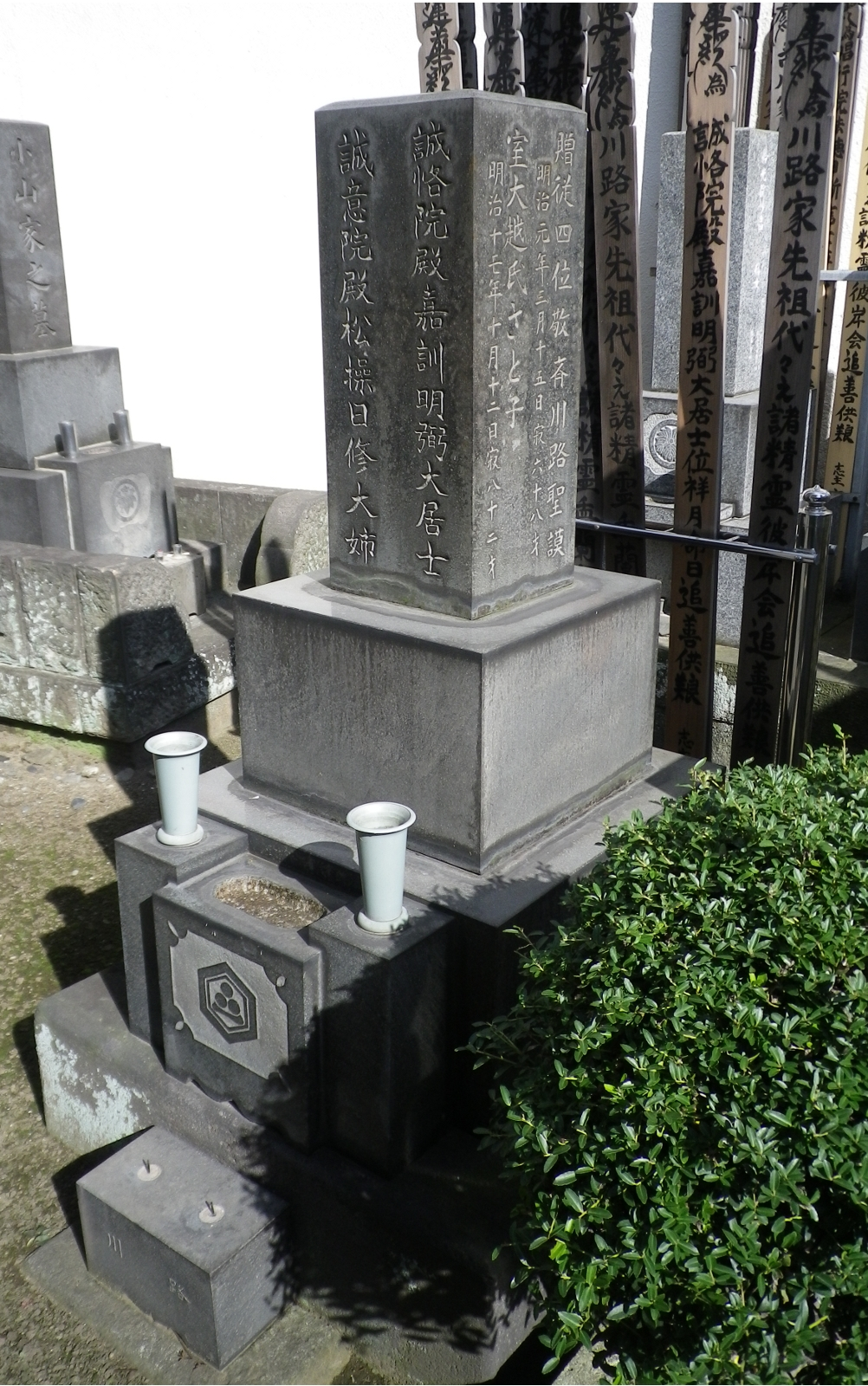 川路聖謨の墓